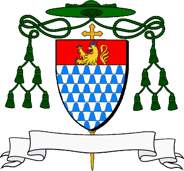 Brizhet, e gab en gwad karget gant ul leon difoupant en aour, krabanet, teodet, ha kurunet en glazur